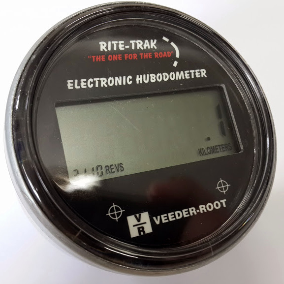 hubodometro veeder root